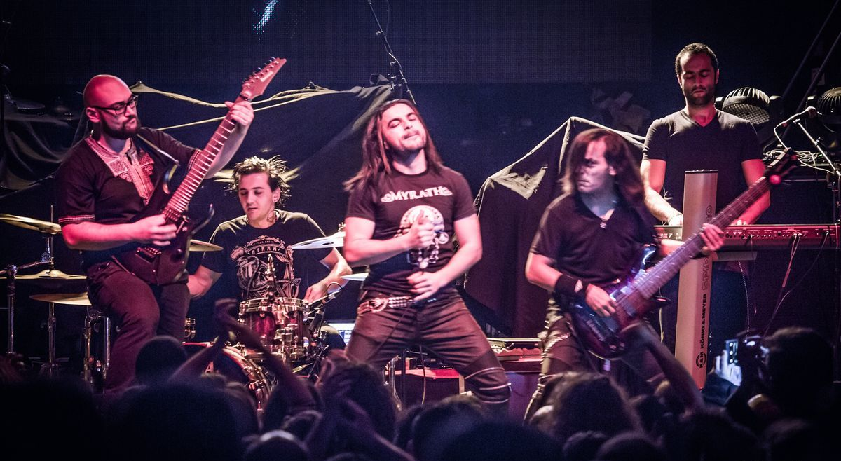 Myrath en España